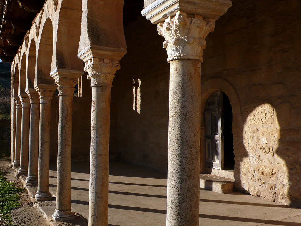 Pórtico del monasterio de San Miguel de Escalada.